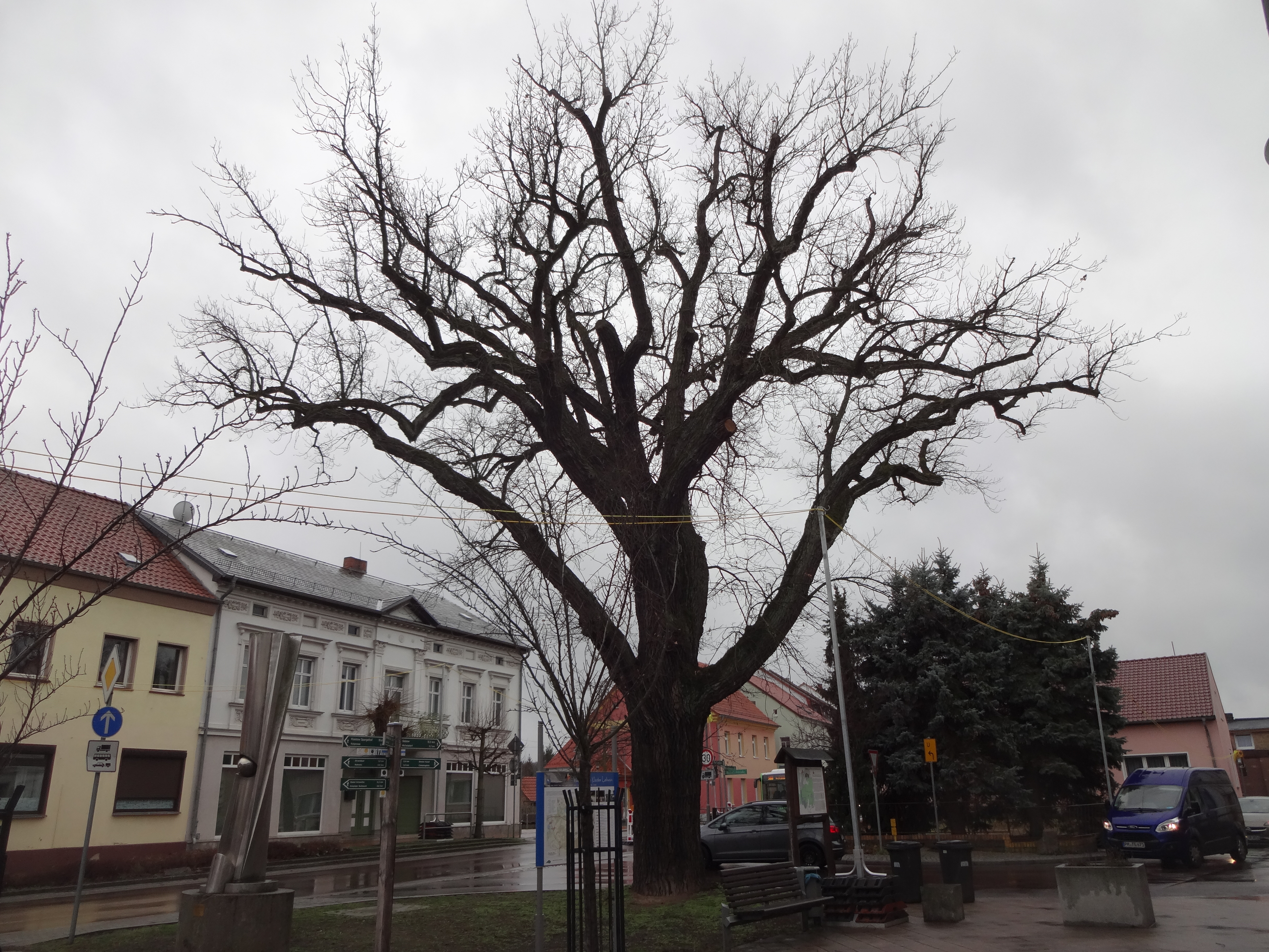 als Naturdenkmal geschützte Stieleiche auf dem Marktplatz in Lehnin